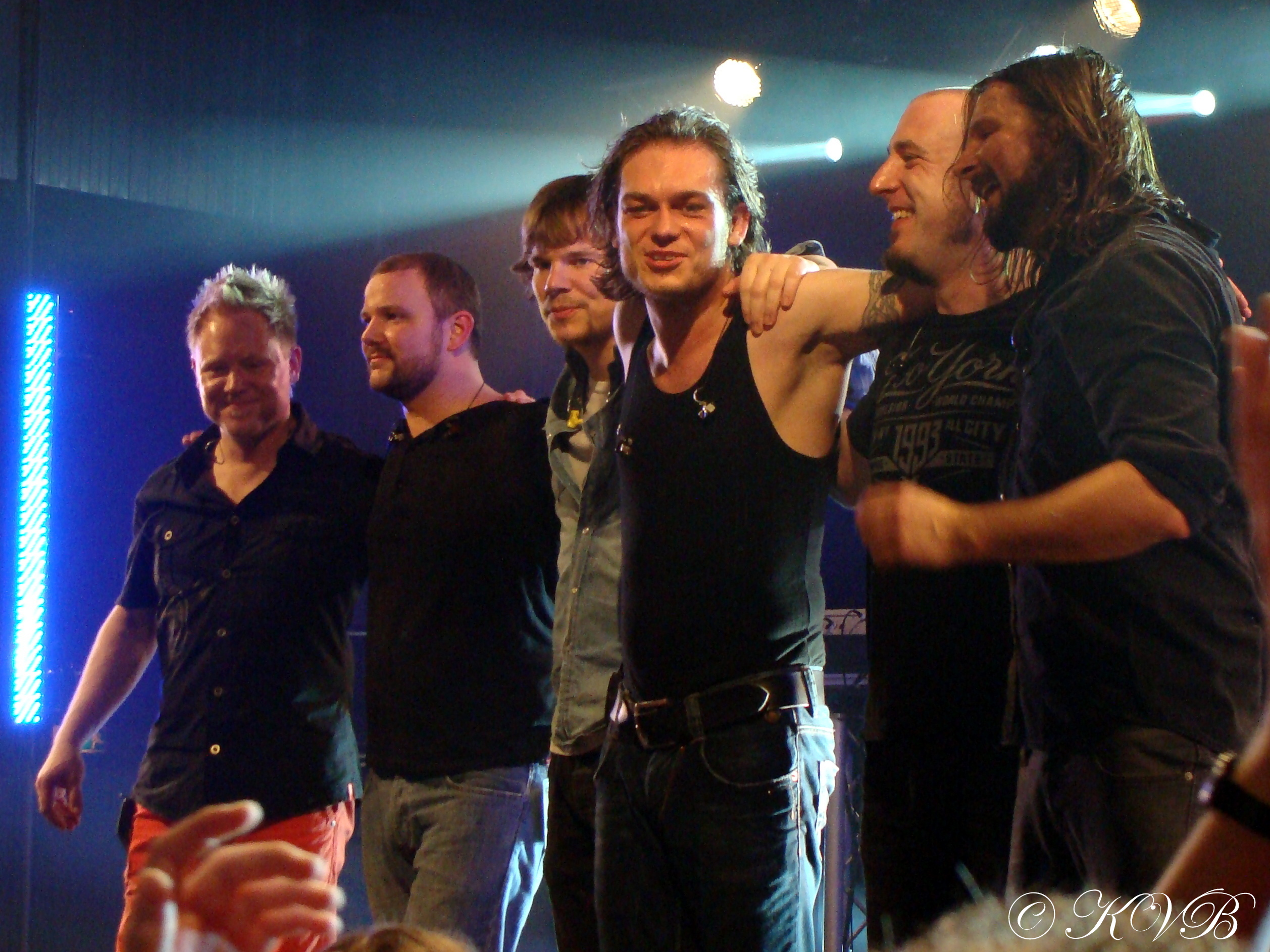 So gewollt-Tour 2011, Recklinghausen 3.12.11